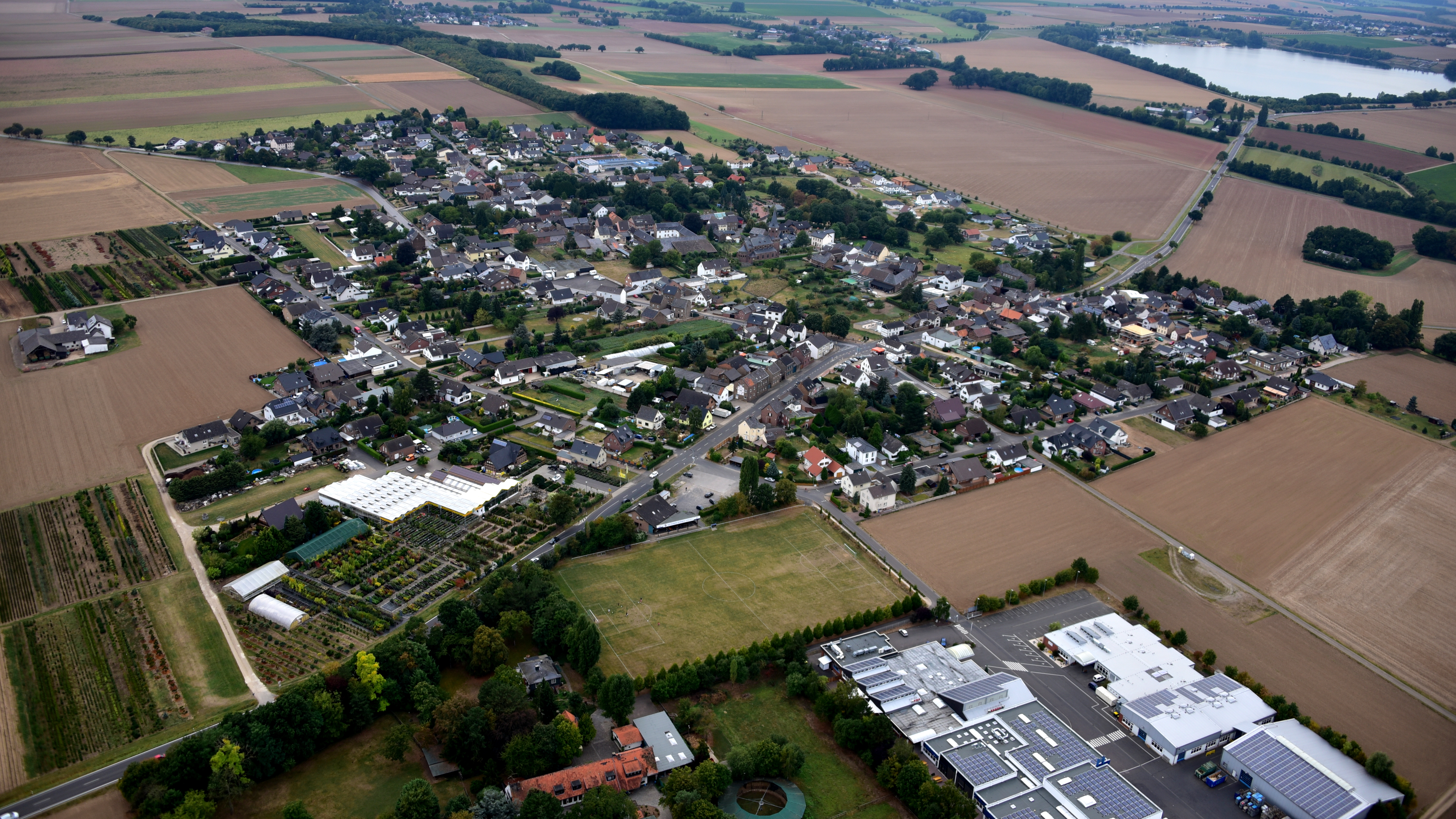 Ülpenich, Luftaufnahme (2016)